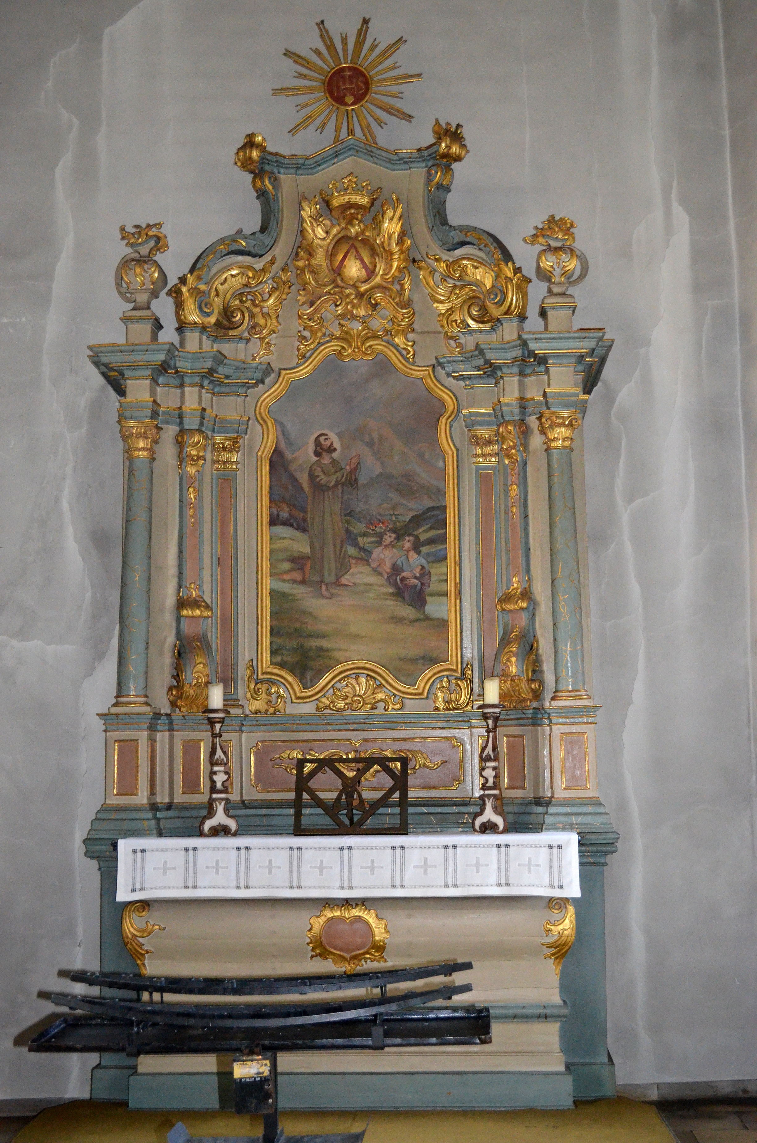 Alme, St. Ludgerus, Seitenalatar 2